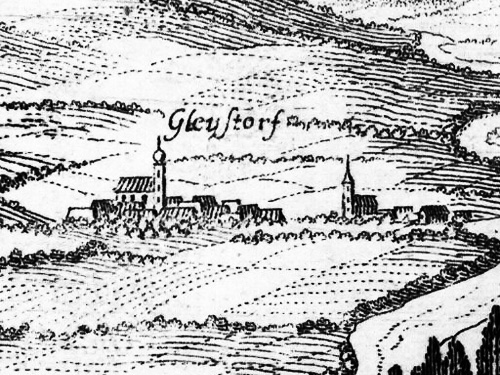 Ausschnitt aus einem Stich "Freiberg" ("Topographia Ducatus Stiria") mit Blick auf "Gleystorf", somit das älteste erhaltene Bild des Marktes Gleisdorf, heute Stadt Gleisdorf